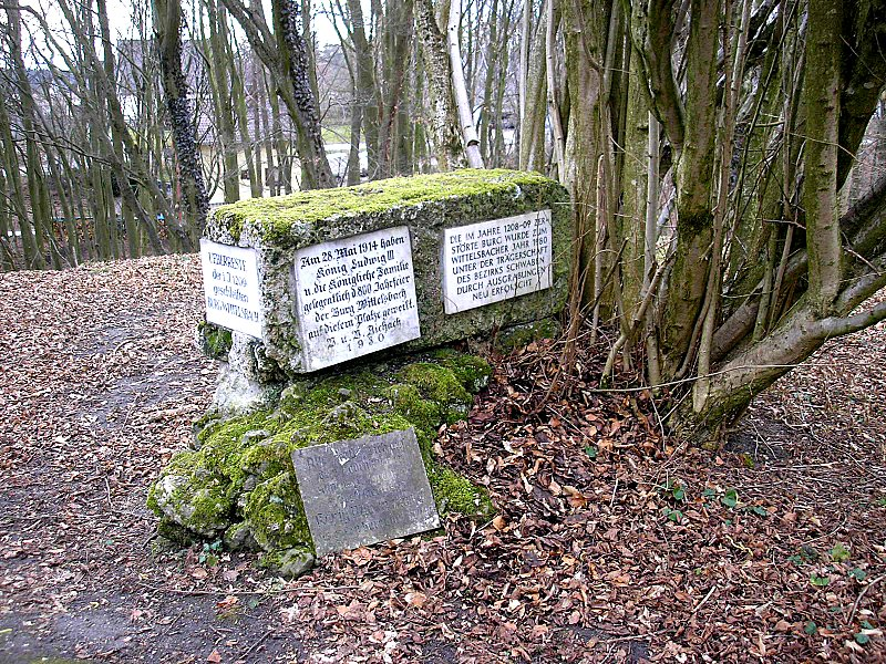 Burg Oberwittelsbach (Wittelsbach) bei Aichach (Landkreis Aichach-Friedberg, Bayerisch-Schwaben). Gedenkstein für die Stammburg der Wittelsbacher. Eigene Aufnahme, Feb. 2007 / Oberwittelsbach (Wittelsbach) castle near Aichach (Bavaria, Germany). Memorial stone for the former family seat of the Dukes of Bavaria (Wittelsbacher). Own photo, Feb. 2007